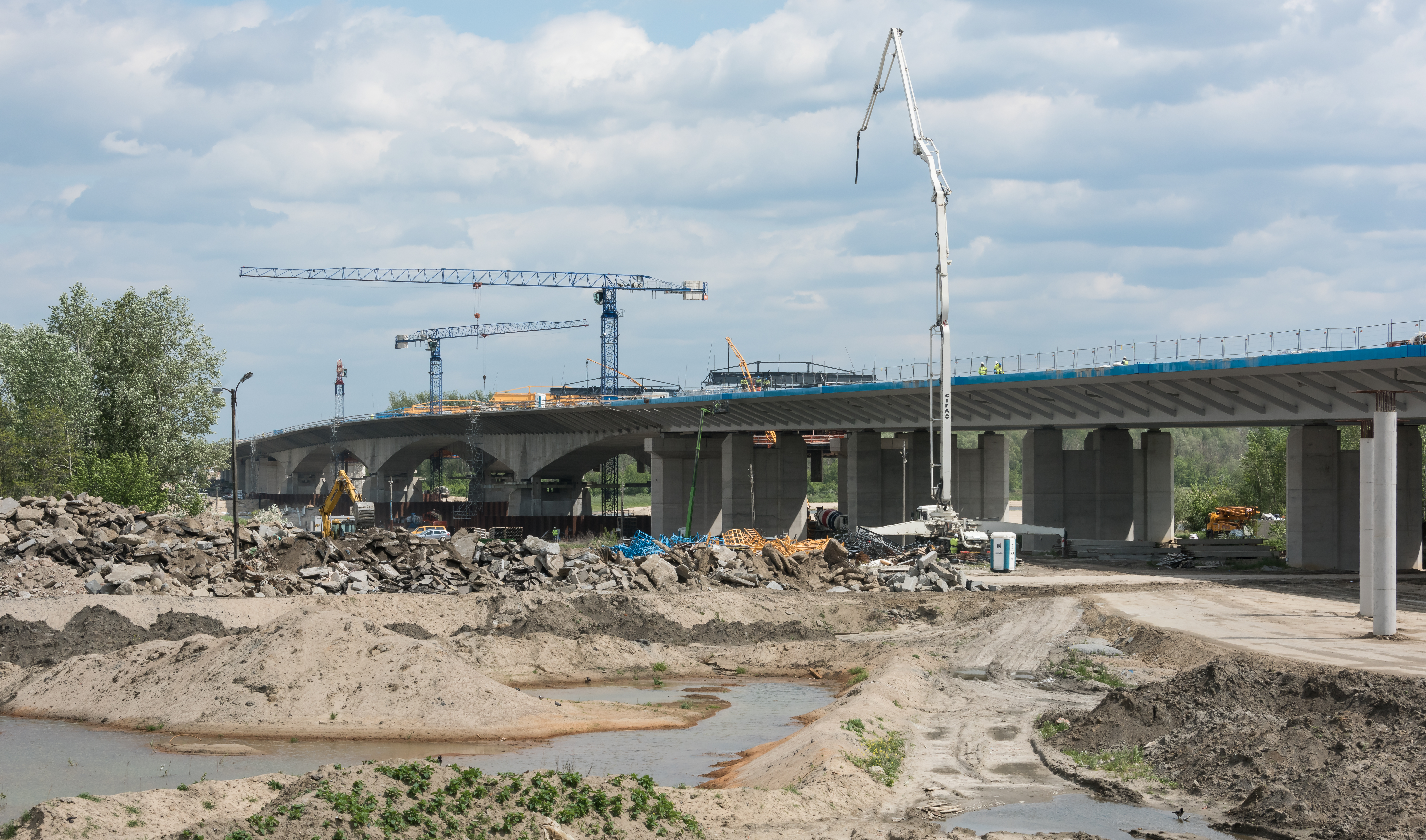 Budowa estakady mostu Południowego w Warszawie, widok z ul. Wał Zawadowski